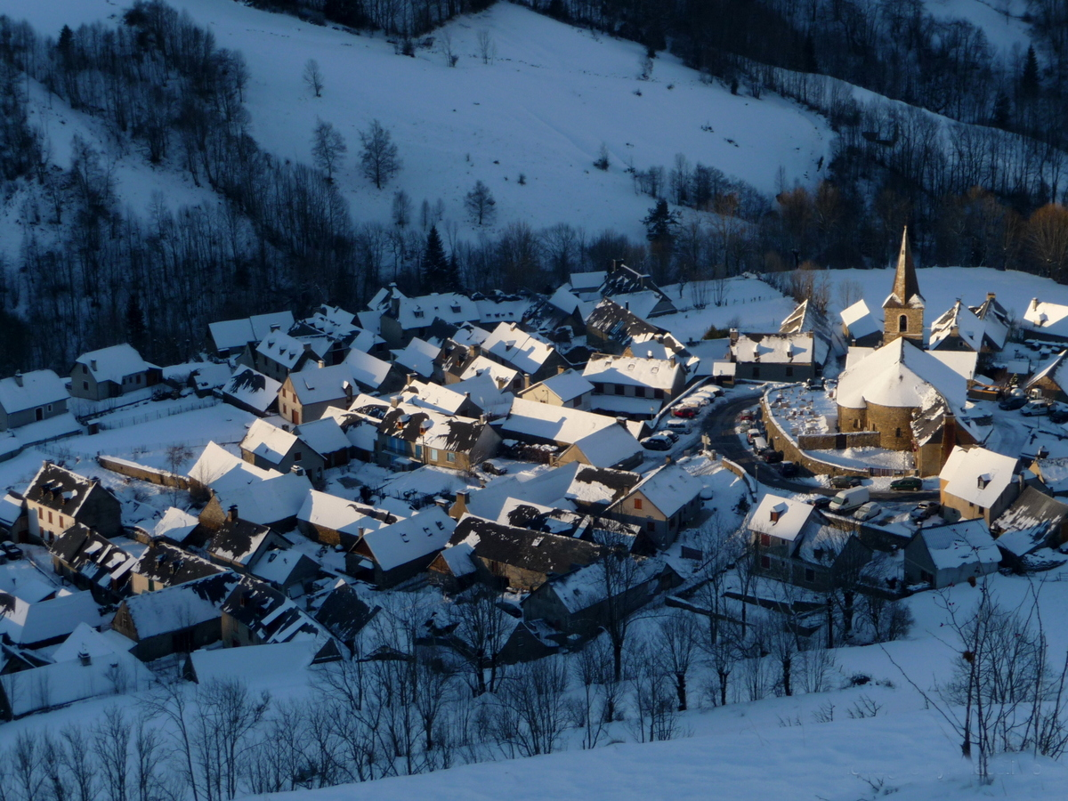 Vue plongeante et hivernale sur le village d'Azet (Vallée d'Aure). Photo prise en matinée depuis la route du col d'Azet.